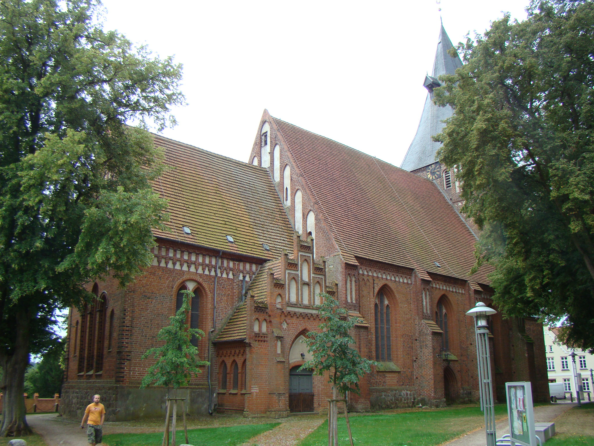 Marienkirche in Gnoien, Ansicht von Nordosten